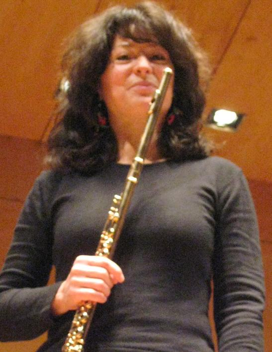 Irena Grafenauer, slovenian flutist